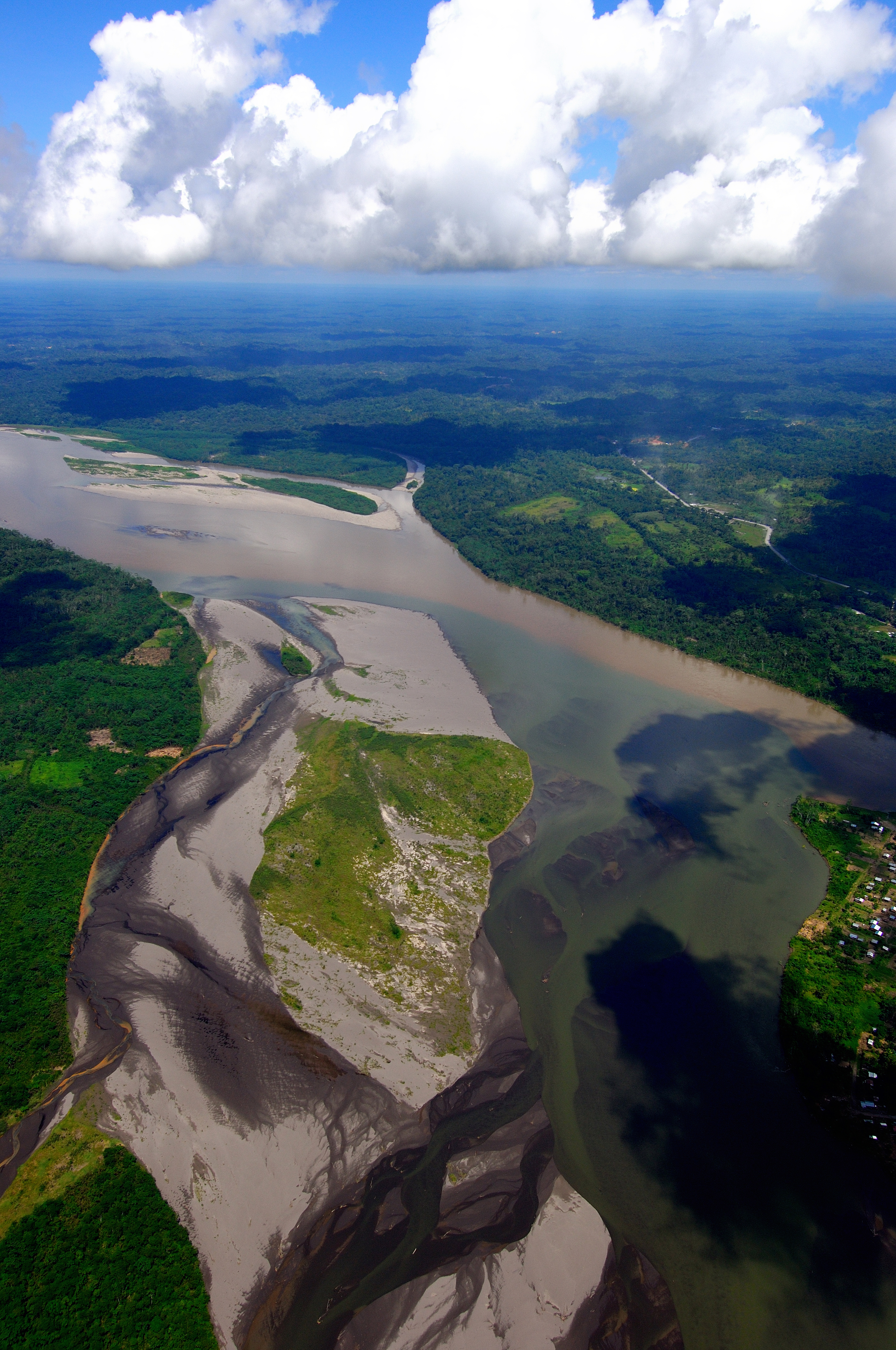 Río NAPO Amazonía 1